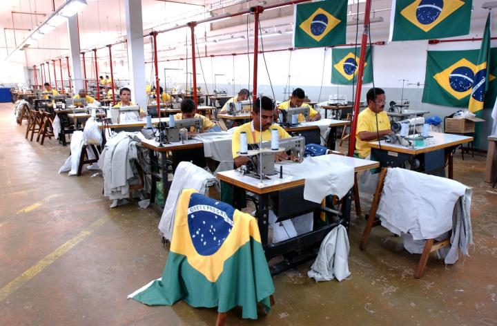 Brasília - Detentos trabalhando na confecção da Papuda (presídio de Brasília).